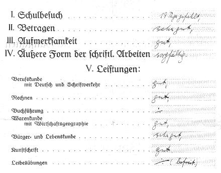 Konrad-Klepping-Berufskolleg - Schülerzeugnis aus dem Jahr 1926